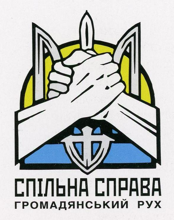 Spilna Sprava logo.